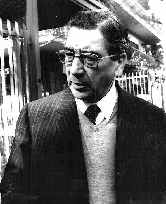 Ritratto del Senatore Vittorio Cervone